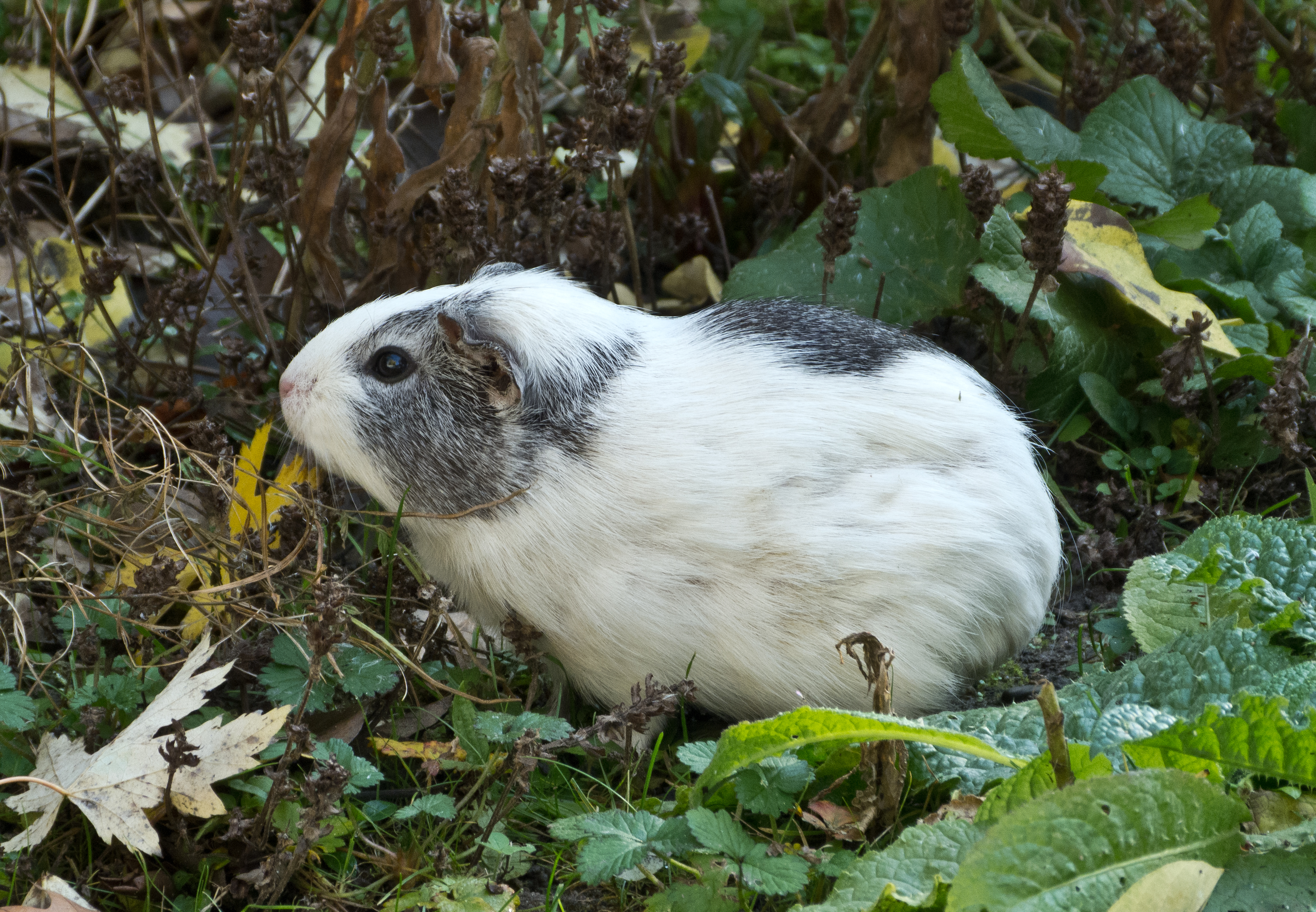 Hausmeerschweinchen (Cavia porcellus) in Freigehege